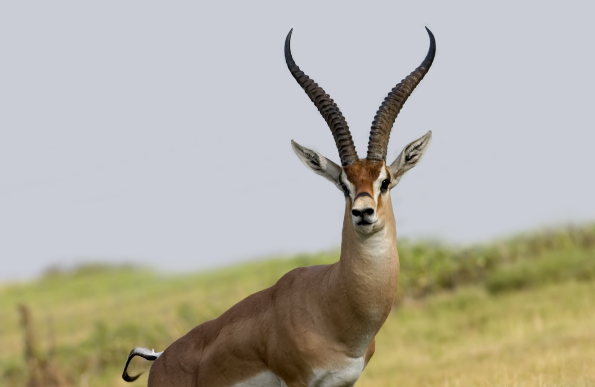 Gazelle Granti closeup